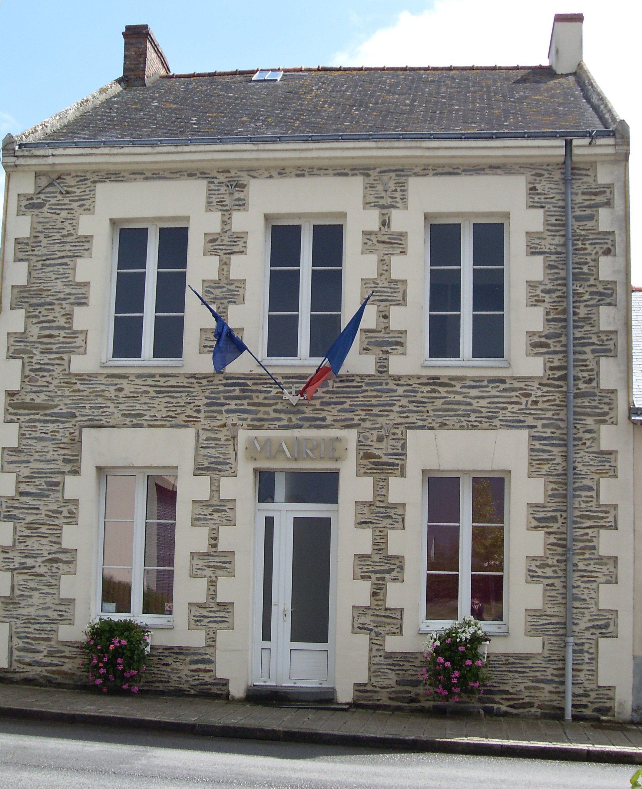 mairie de Conquereuil